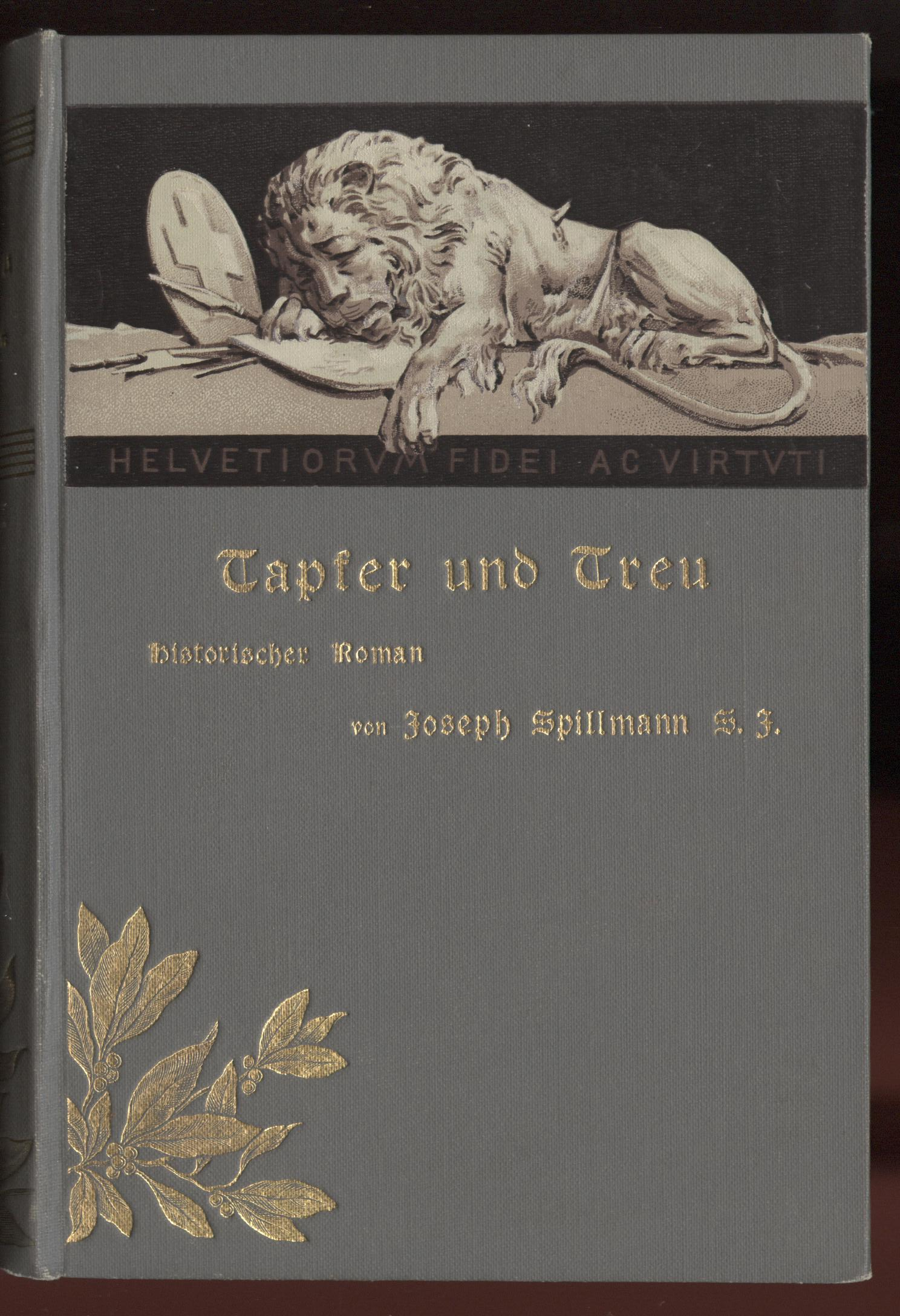 Joseph Spillmann, Jesuit, Volksschriftsteller, Bucheinband